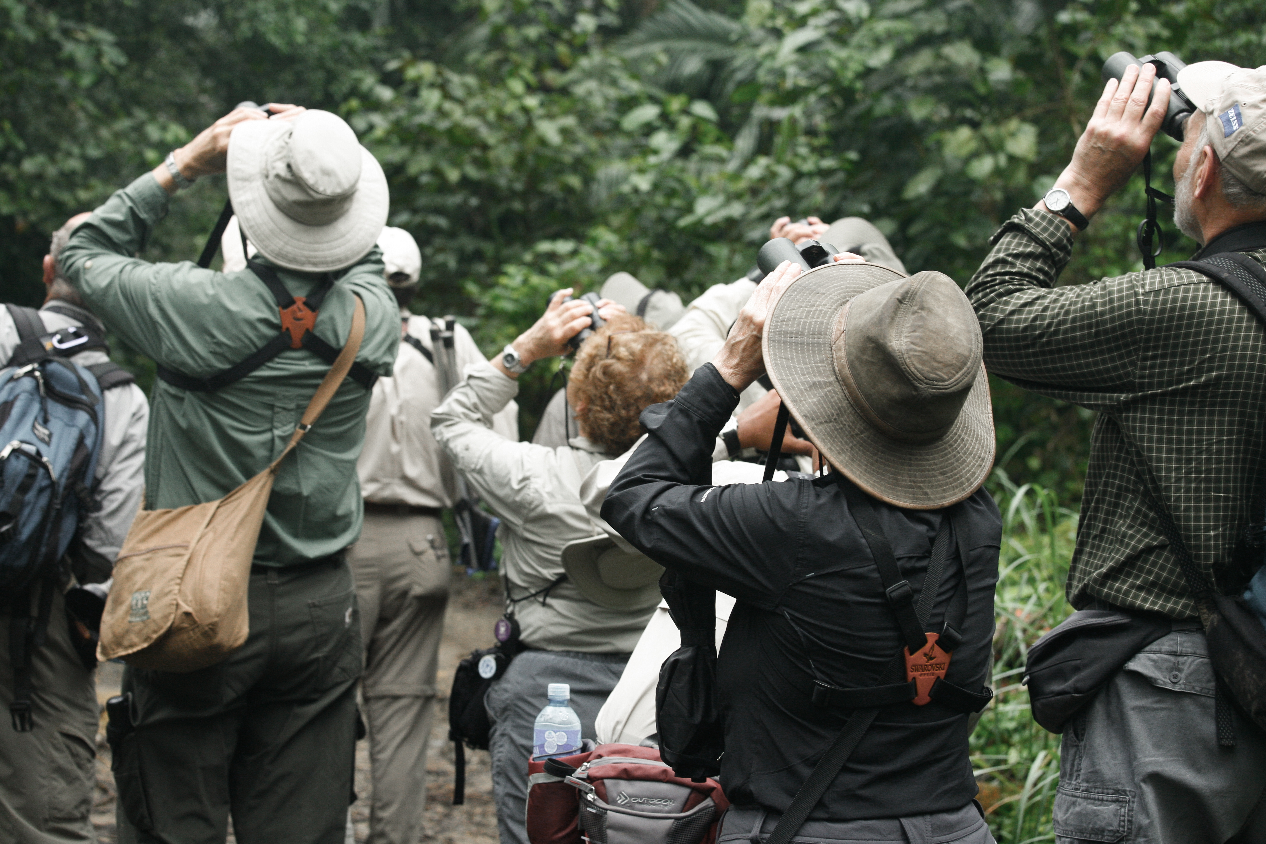 Birdwatching in Panama